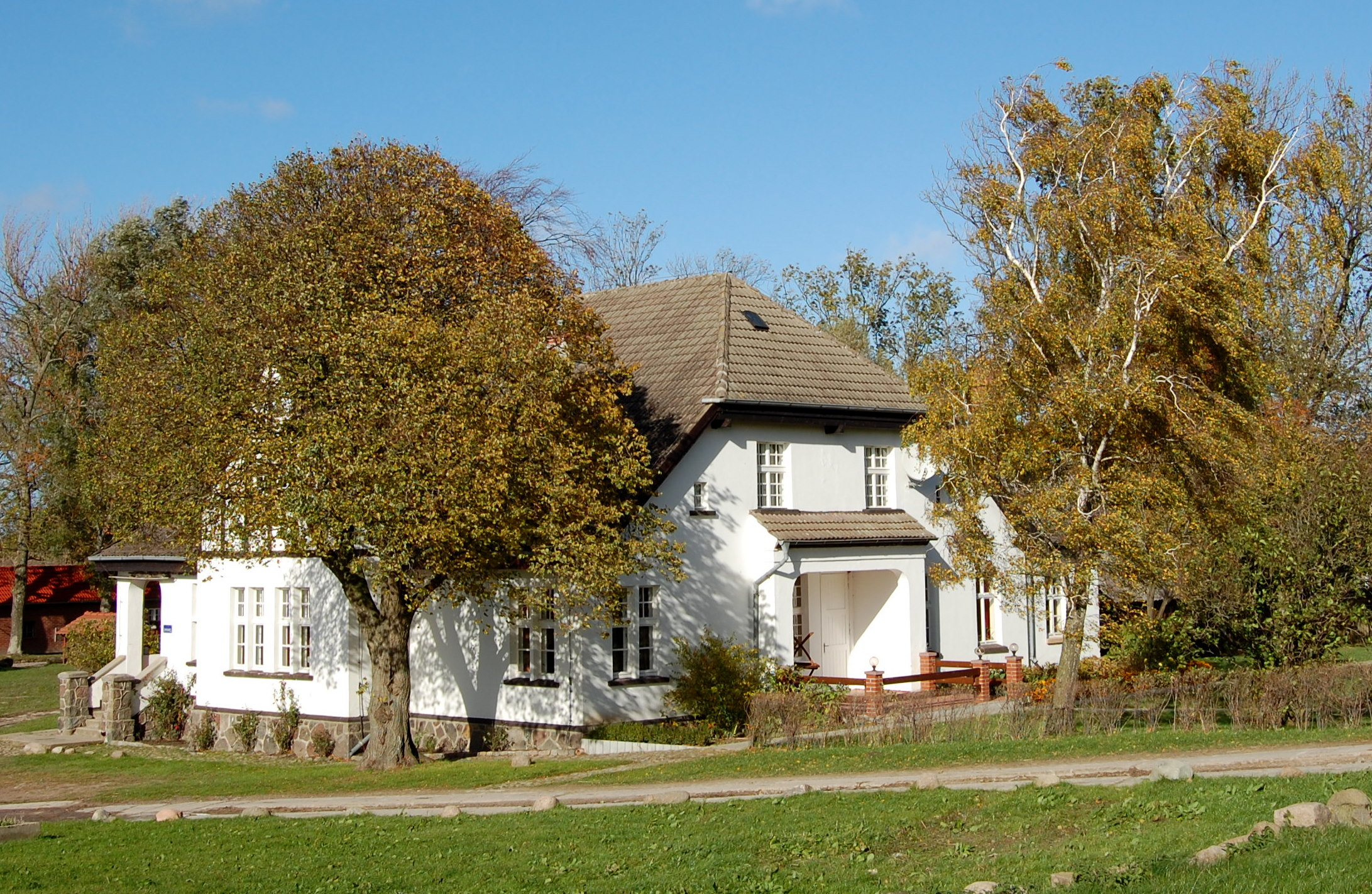 Haus in Bisdamitz auf Rügen